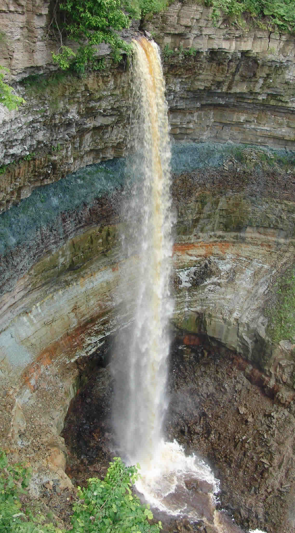 Der Wasserfall von Valaste mit viel Wasser, was eher selten sein soll.